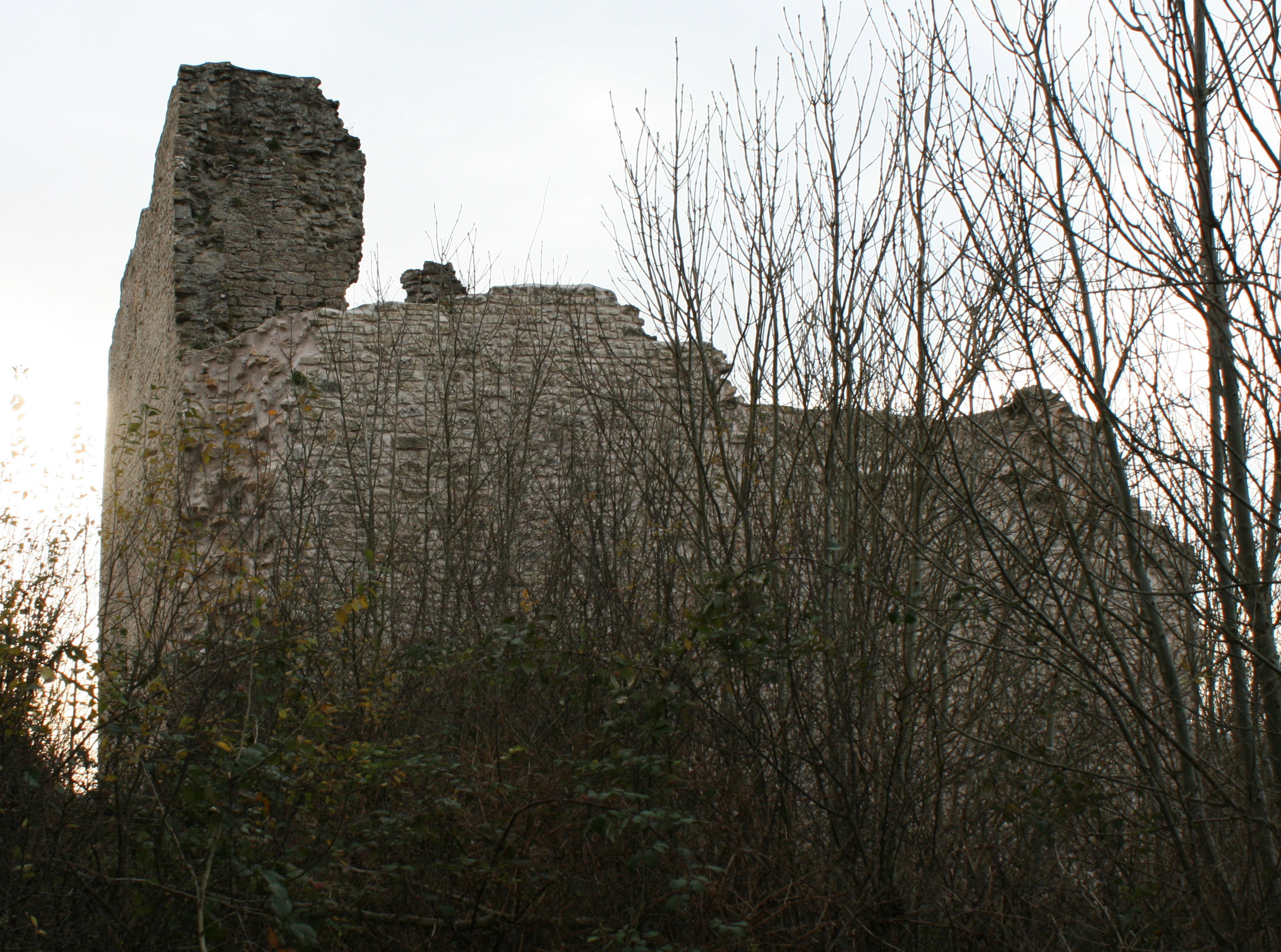 Mur nord de la tour Brunehaut à Vaudémont ( Meurthe et Moselle, France )